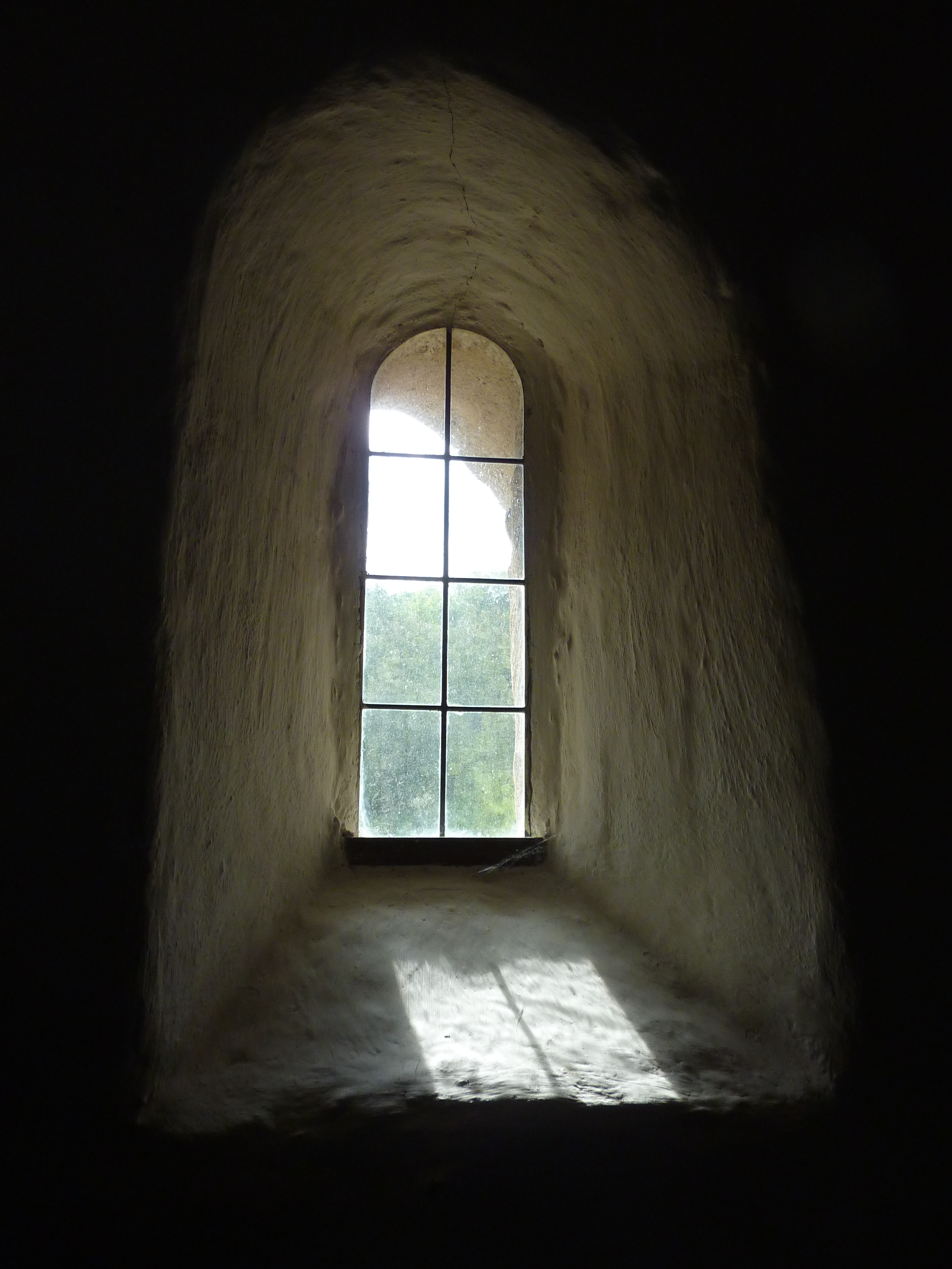 Fenster Südwand Alte Kirche